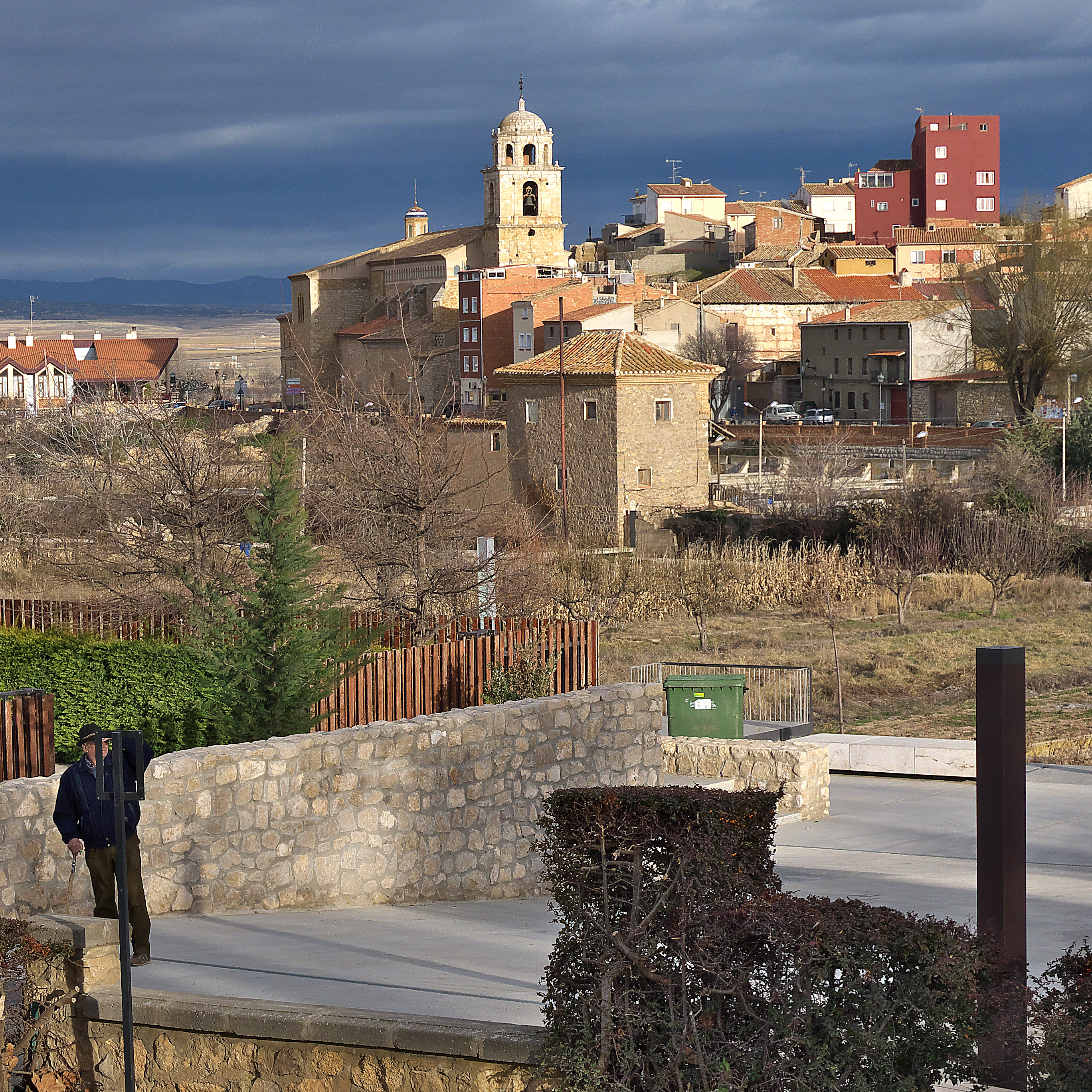 Una vista de Cella